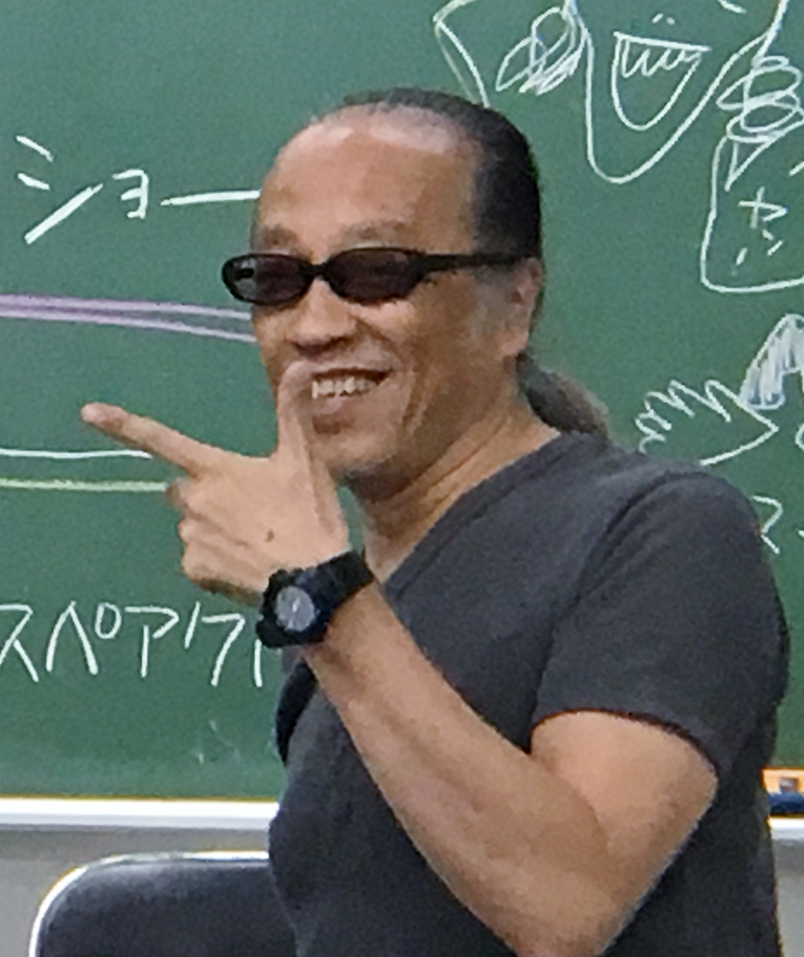 「スペシャルアクターズ ネタバレ全開トークショー」（東京学院ビル3F）にゲスト出演した漫画家のえびはら武司